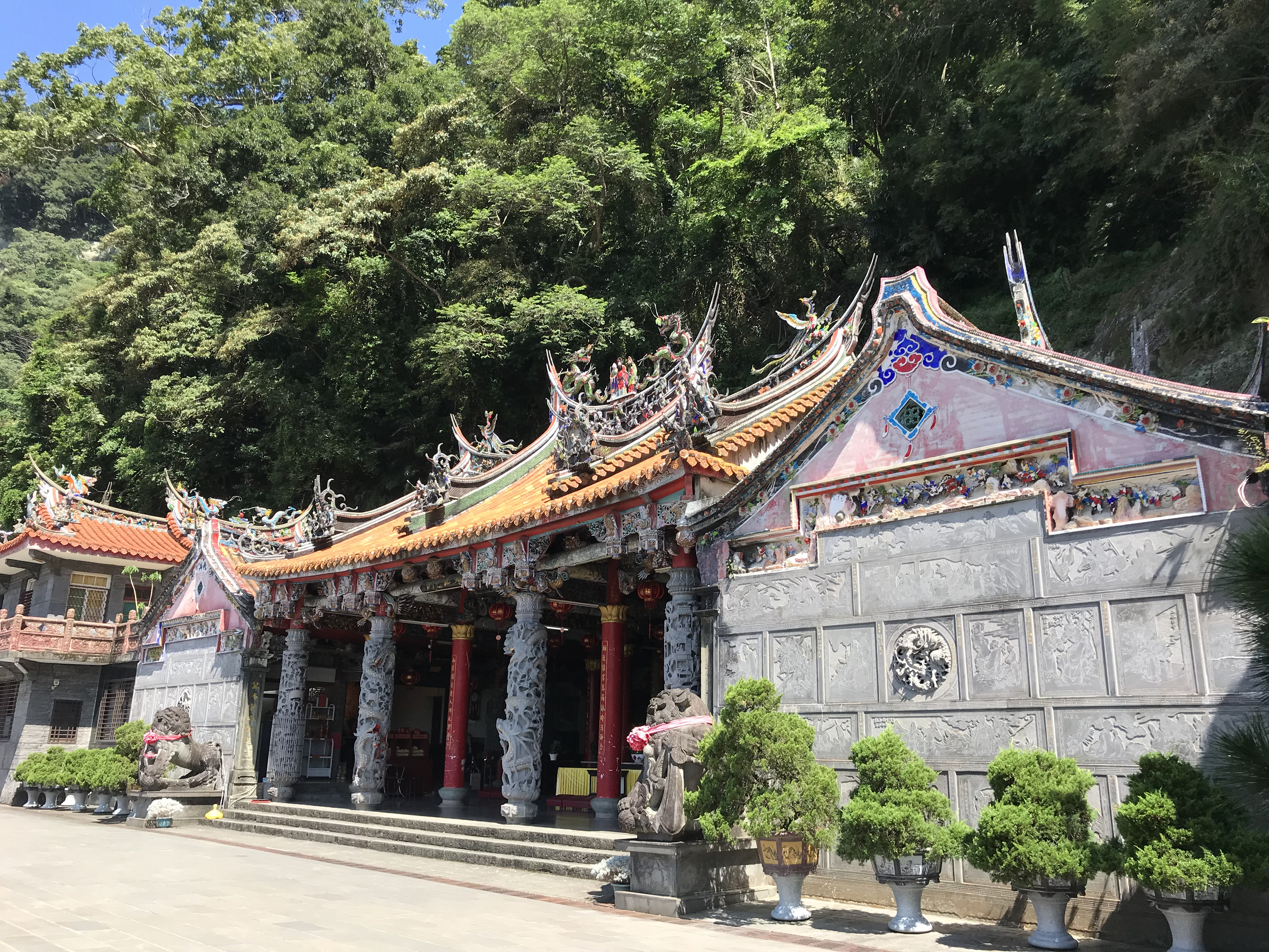 中文（台灣）: 獅頭山勸化堂斜照